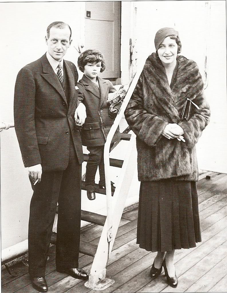 Великий князь Дмитрий Павлович с женой и сыном